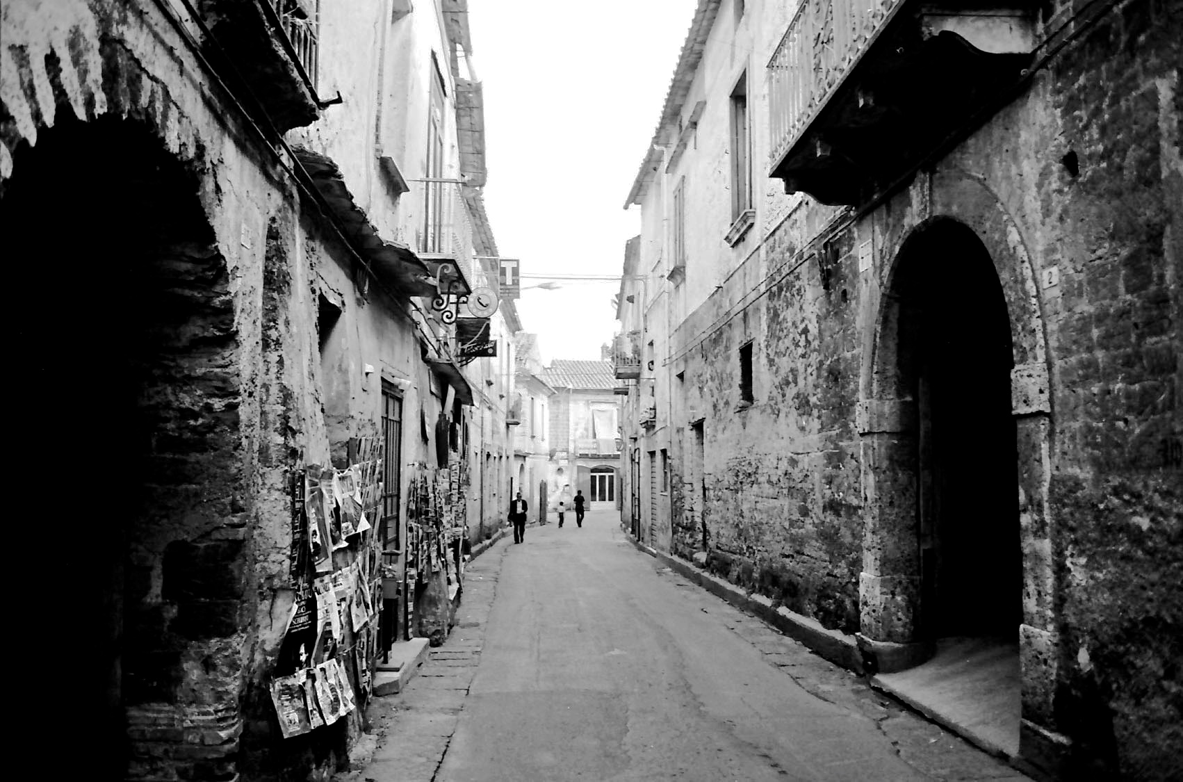 Lancusi (Fisciano) 1980 Via Mag. G.Pecoraro